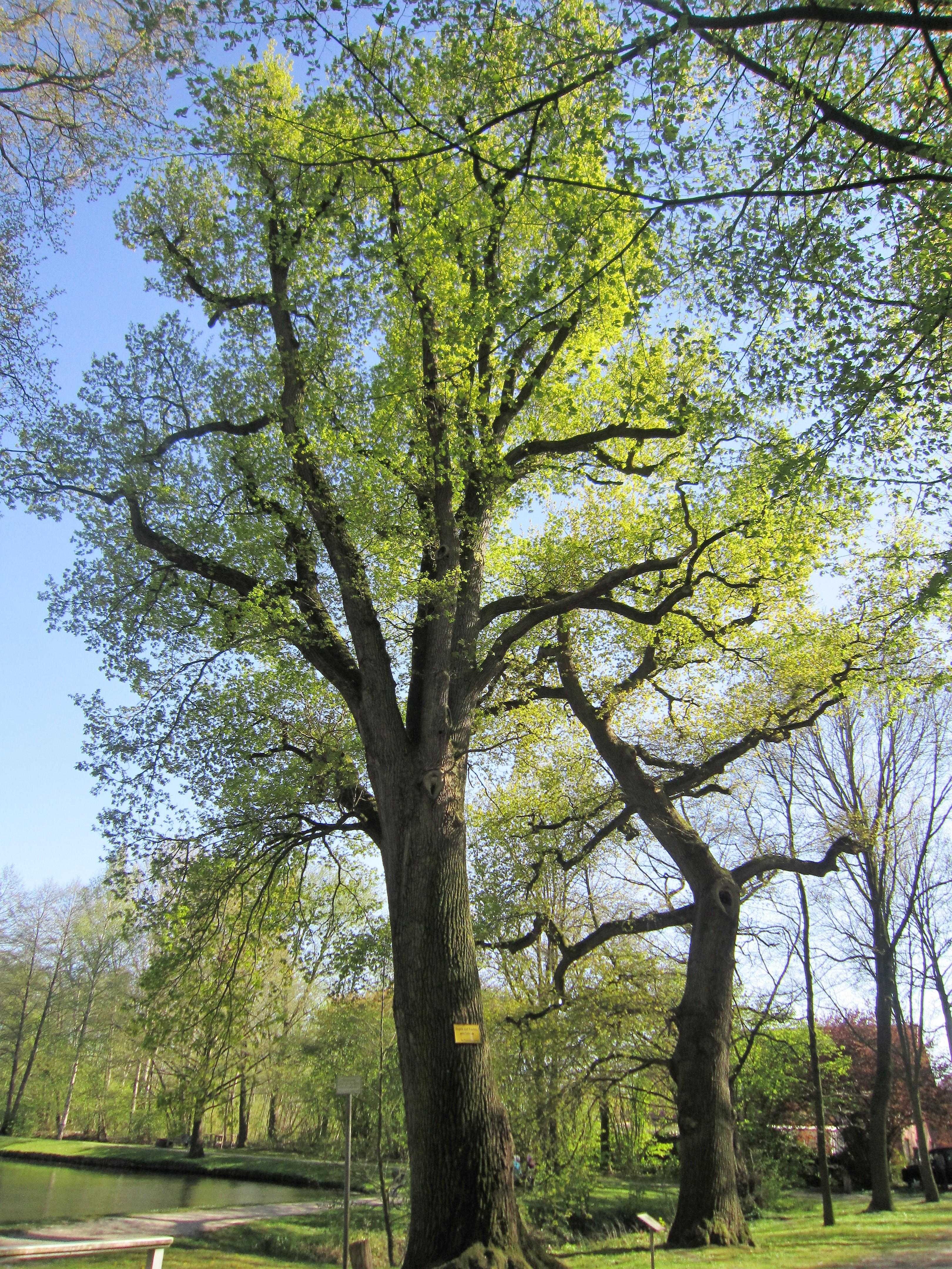 Naturdenkmal ND VEC 00067 (zwei Stieleichen) am Teich bei der Burg Hopen in Lohne (Oldenburg), Landkreis Vechta in Niedersachsen.